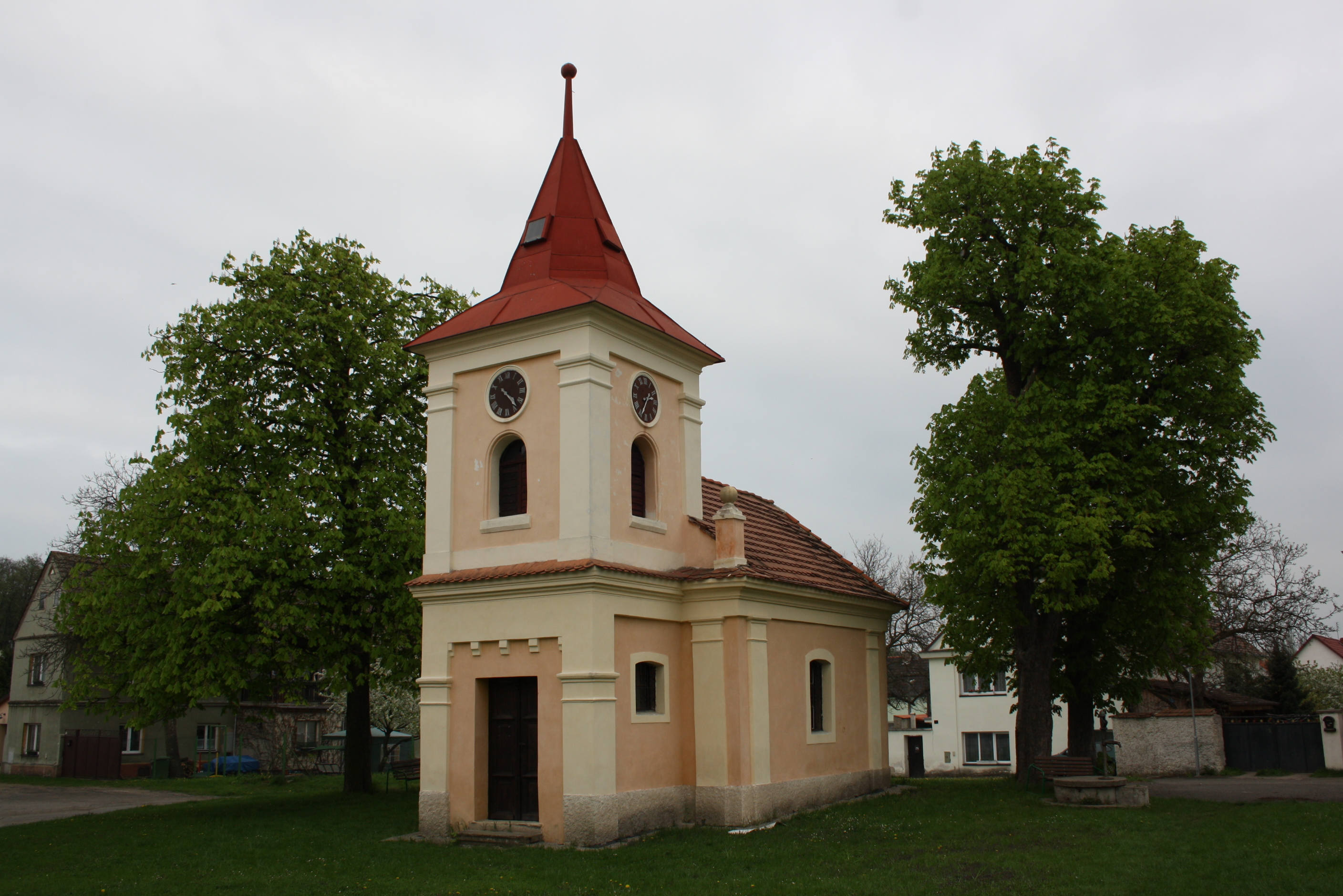 Kaplička na návsi v Polepech v okrese Litoměřice.